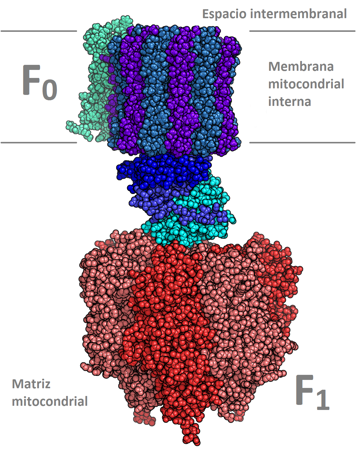 Complejo ATP sintasa